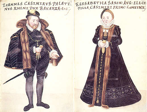 Pfalzgraf Johann Casimir Verweser der Kurpfalz 1583-1592 und seine Gemahlin Elisabeth von Sachsen (in Hochzeitskleidung). Miniatur aus Markus zum Lamm, Thesaurus ..., Bd. 1 (4), Darmstadt, Hess. Landes- und Hochschulbibliothek. Abb. aus Die Renaissance im dt. Südwesten. Katalog. Bd. 2 S. 828